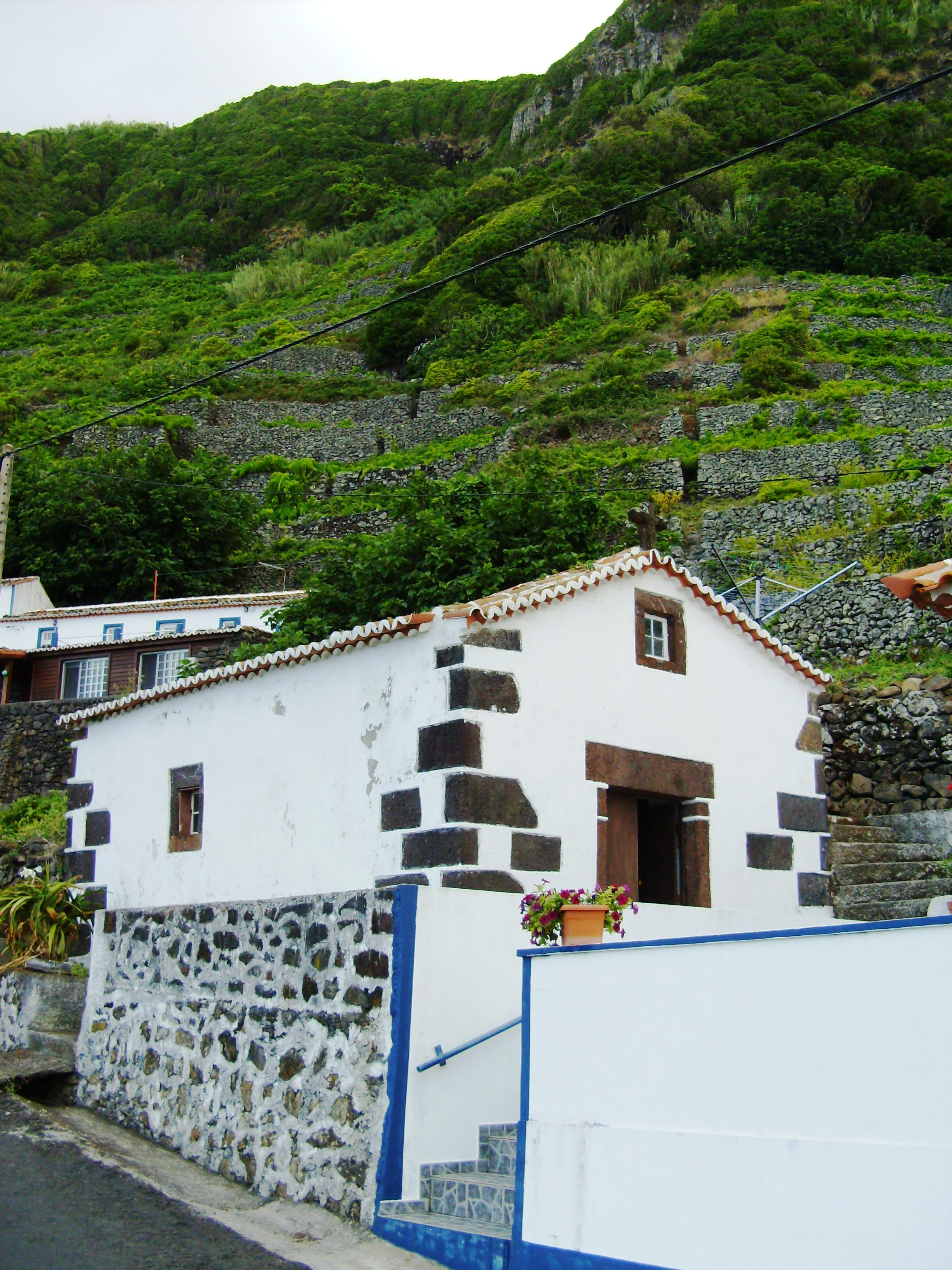 Ermida de Nossa Senhora do Desterro, Vila do Porto, Ilha de Santa Maria (Açores), Portugal.